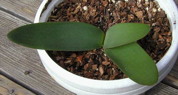 Brunsvigia marginata Blaetter